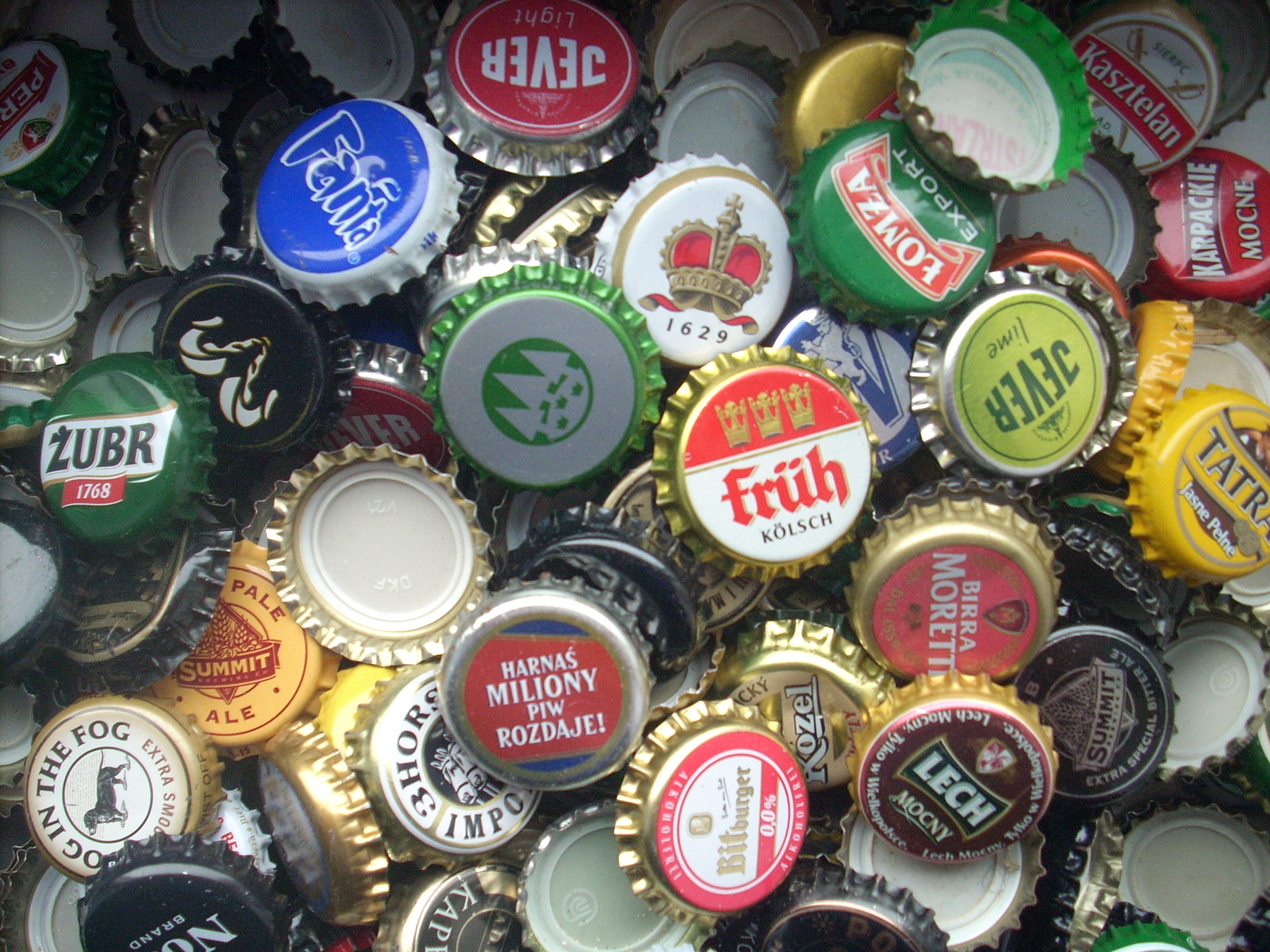 Kapsle butelkowe.